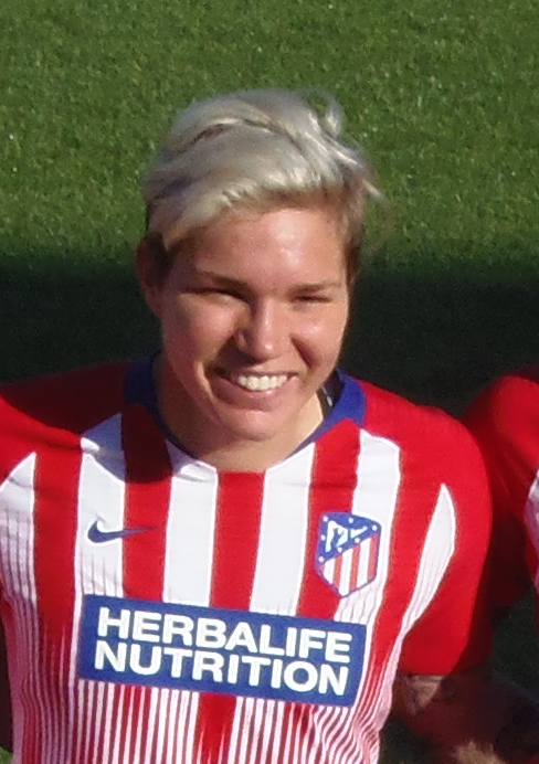 Elena Linari posando antes del partido entre el Atlético de madrid y el valencia el 27 de abril de 2019